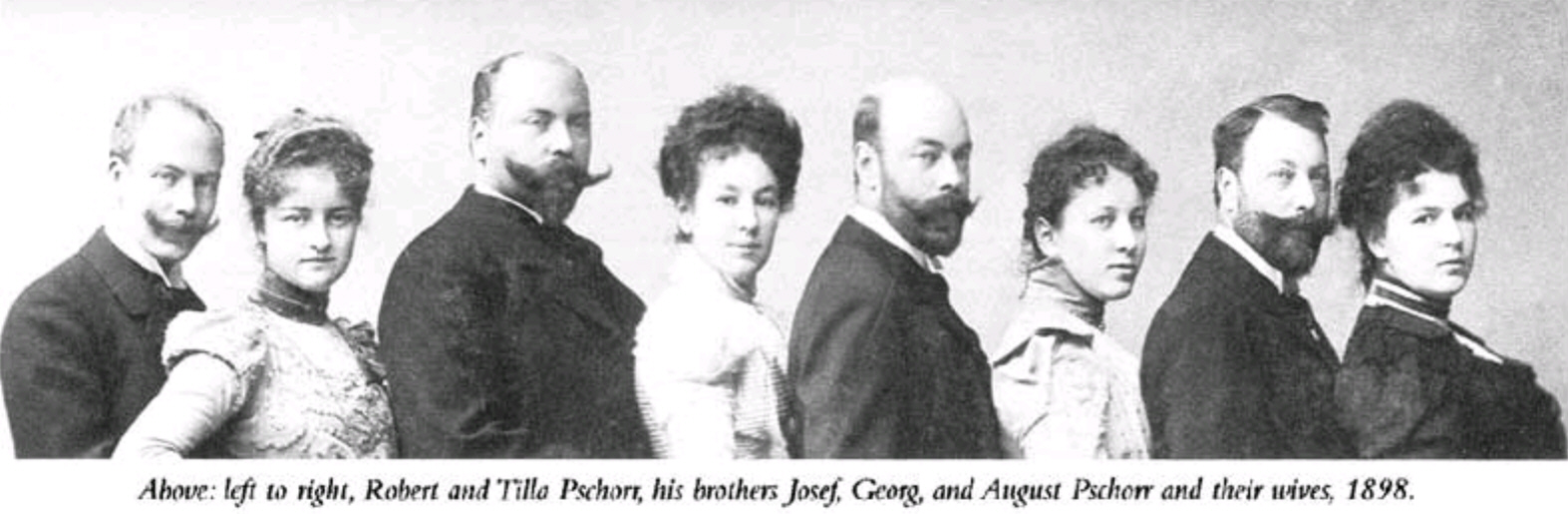 Die Söhne des Brauers Georg Pschorr jun (1830–1894): vlnr. Robert Pschorr (* 4. Dezember 1868 in München; † 23. Februar 1930 ebenda) mit Ottilie Scherer, ∞ 11.04.1899 (* 14. Oktober 1878 in Frankfurt aM; † 23. Oktober 1954 in Feldafing) Joseph Pschorr (* 11. April 1867 in München; † 1942 in Feldafing) Georg Theodor Pschorr (* 18. Juni 1865 in München; † 4. Februar 1949 in Tegernsee) August Pschorr (* 1. Oktober 1862 in München; † 20. Oktober 1935 ebenda)